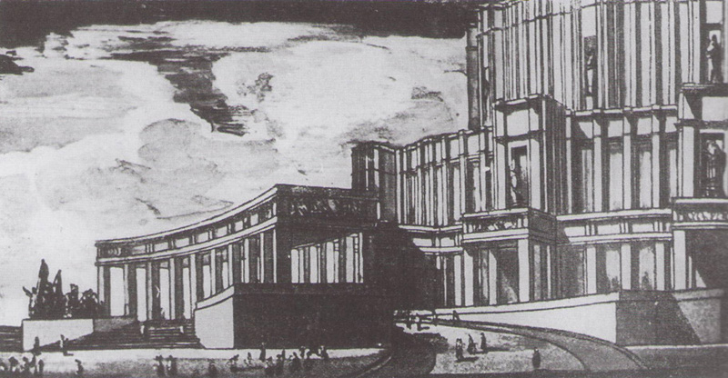 Театр оперы и балета в Минске. Проект. Перспектива центрального входа